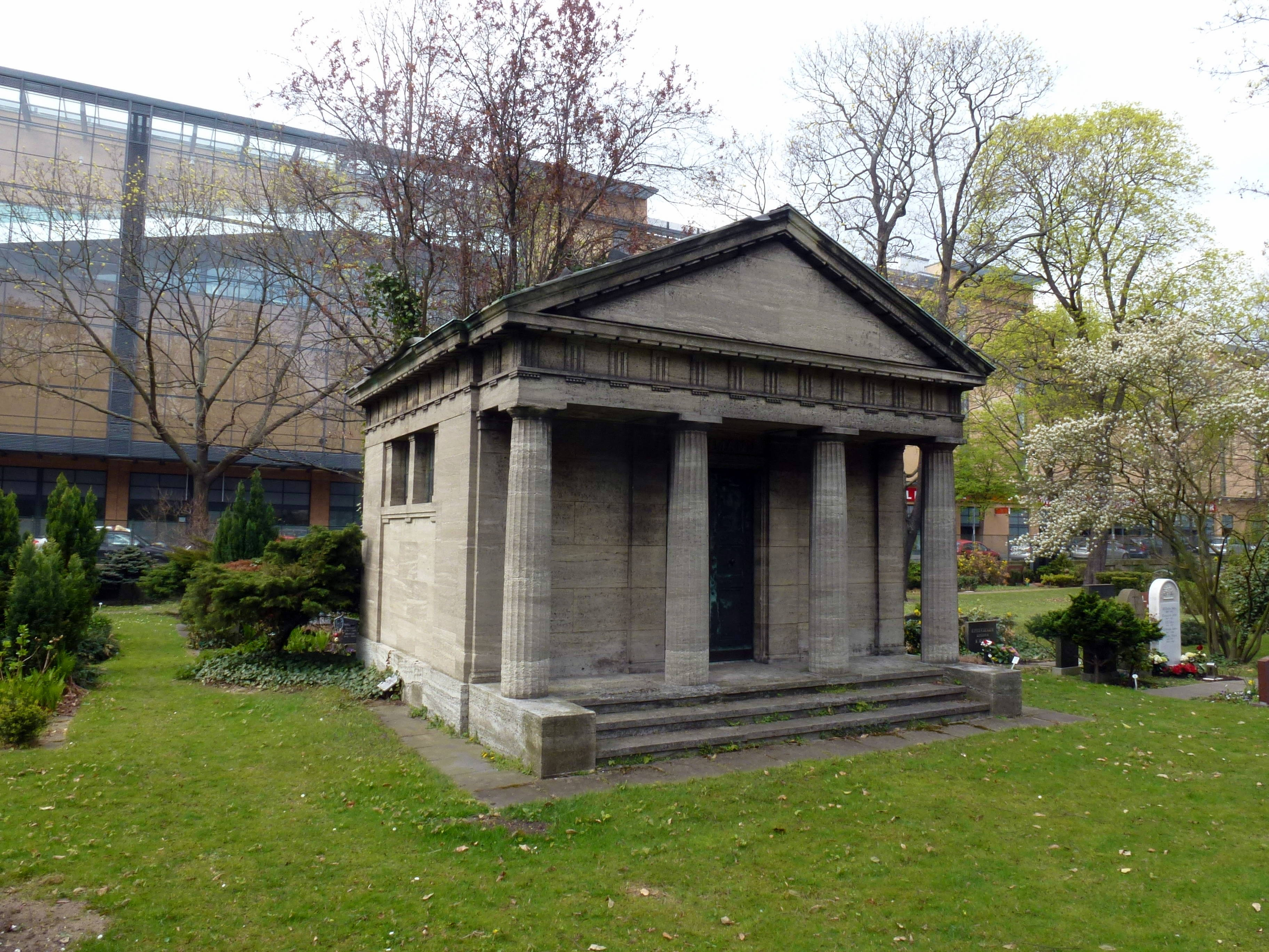 St. Philippus-Apostel-Kirchhof Mausoleum Bathmann